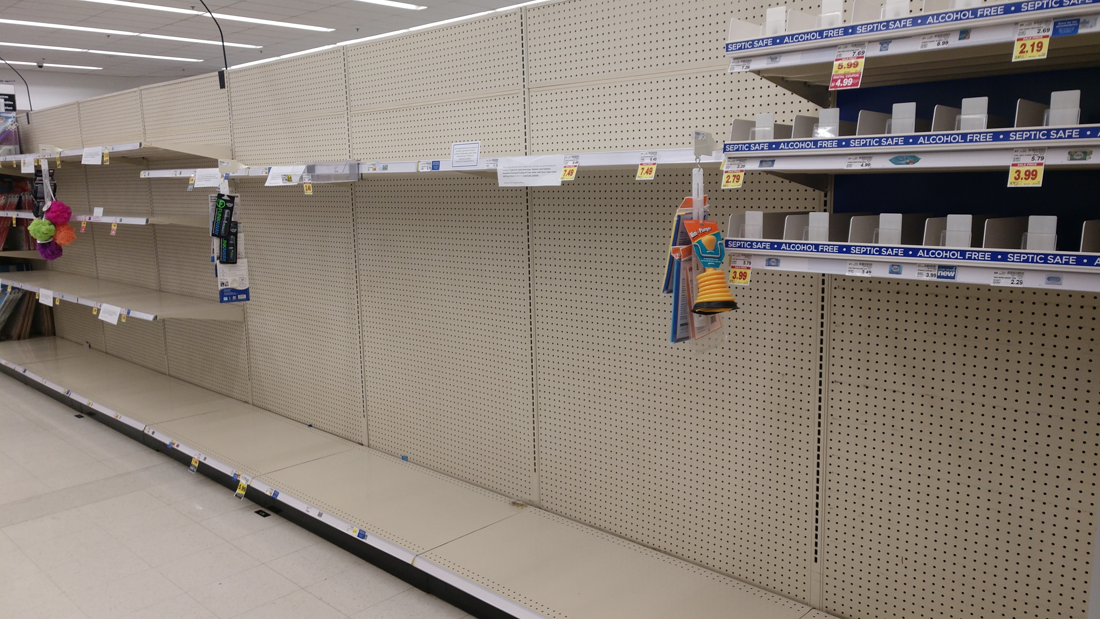 Kroger